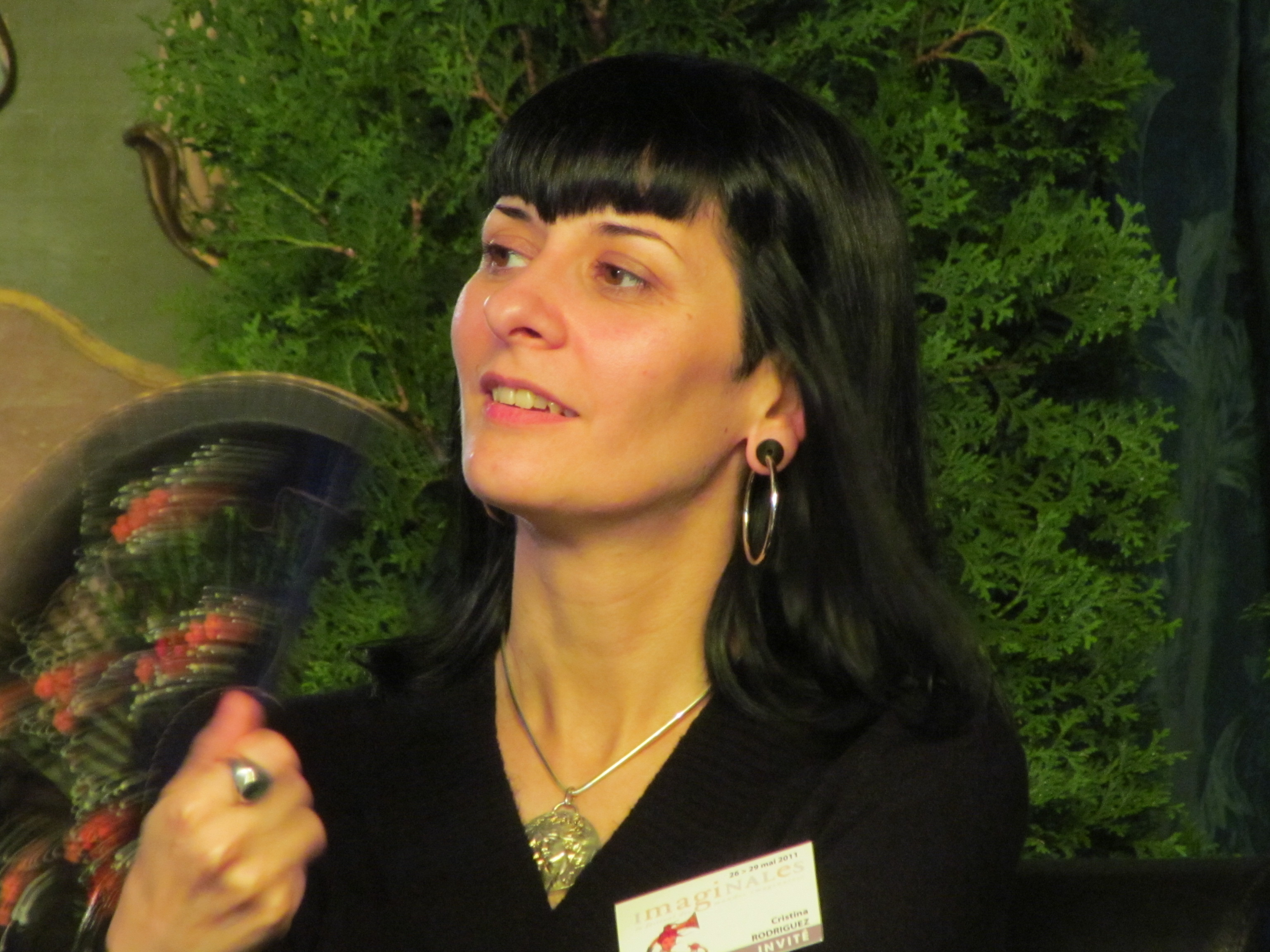 L'écrivaine Cristina Rodriguez au festival des mondes imaginaires Les Imaginales (10ème édition) en mai 2011 à Epinal (département des Vosges en France).